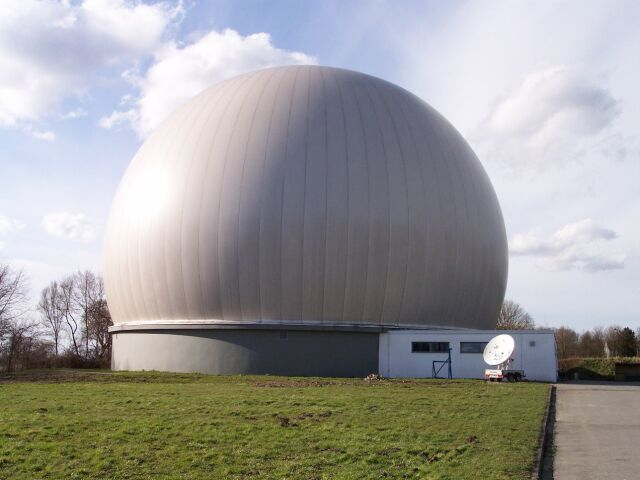 Bild aus Bochum, selbst aufgenommen, GFDL Kategorie:Bild (Bochum)